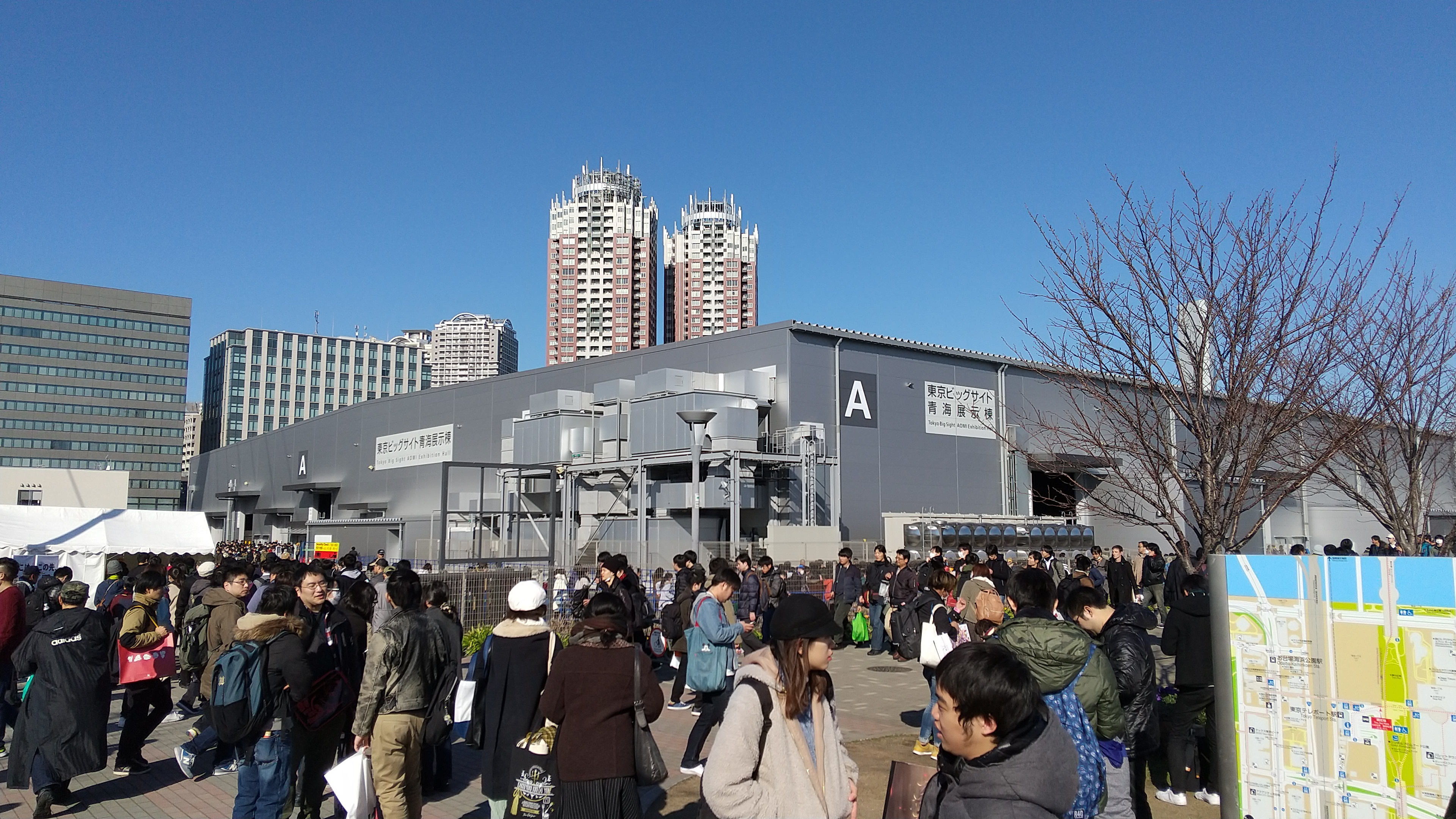 東京国際展示場の青海展示棟において開催されたコミックマーケット97の様子（企業ブース）